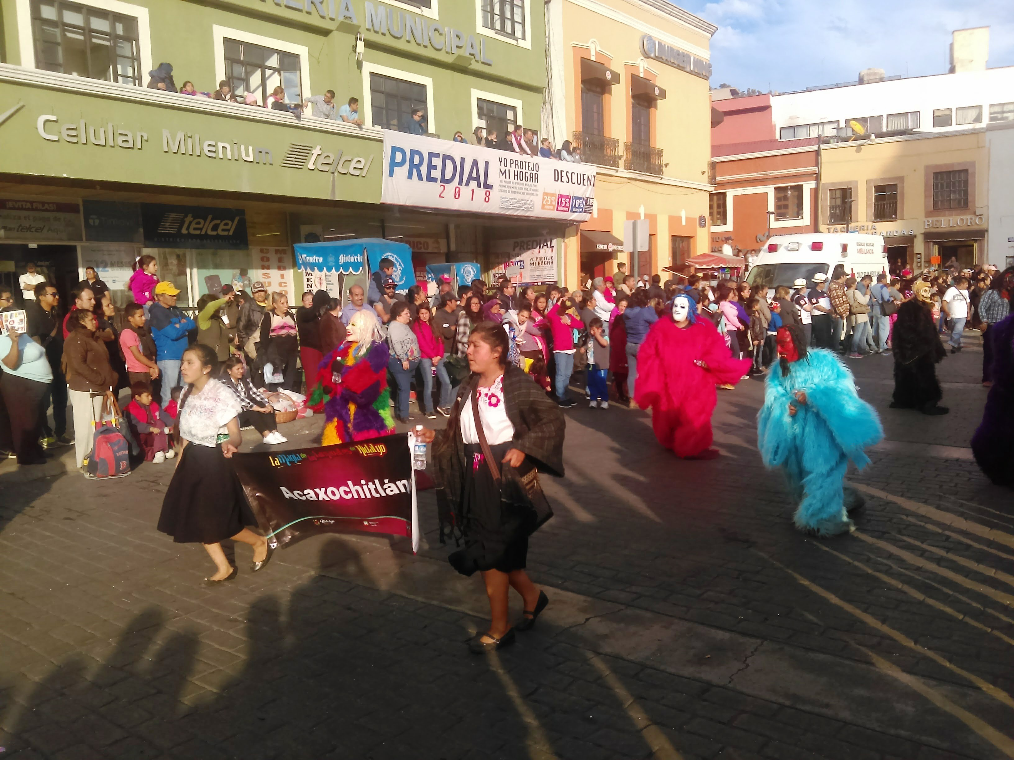 Desfile "Magia de los Carnavales de Hidalgo" en Pachuca de Soto, México (2017). Representación del Municipio de Acaxochitlán.